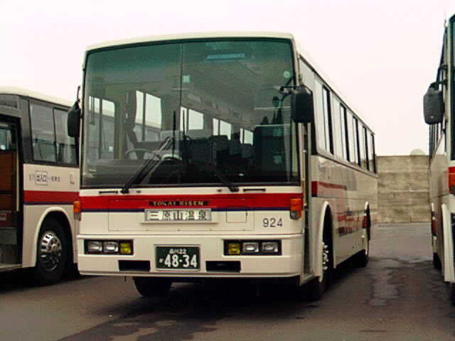 Tokai Kisen (Oshima Bus)U-UA520RAN at Okada Port.